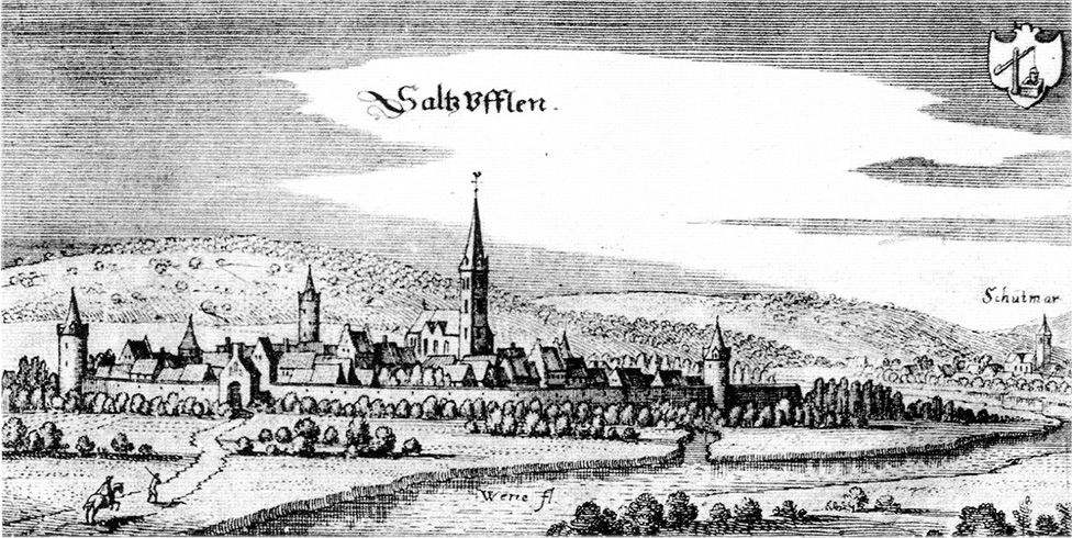 Ansicht der Stadt Salzuflen im Jahre 1647 (von Südwesten). Im Hintergrund rechts Schötmar. Kupferstich von Matthäus Merian.